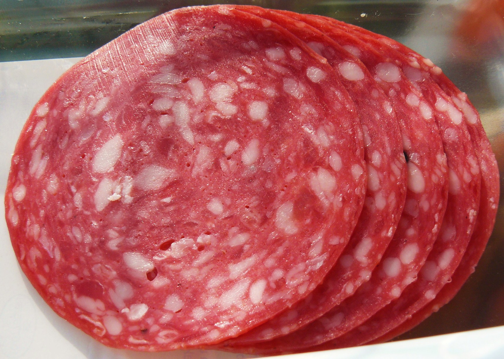 Hiszpańska salami.